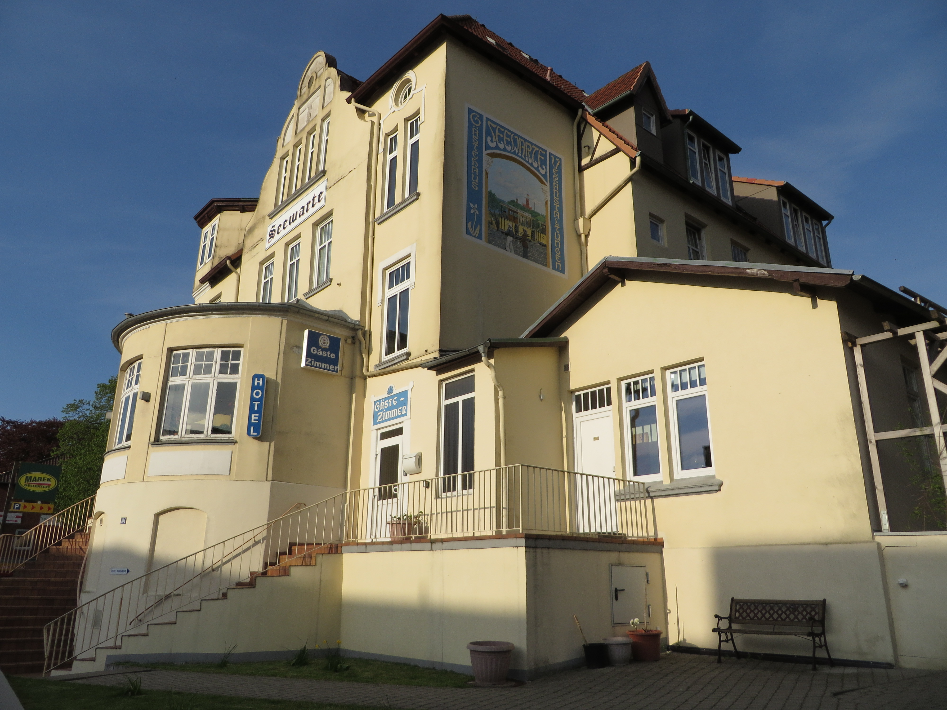 Hotel Seewarte (Flensburg-Mürwik Mai 2015), Bild 01